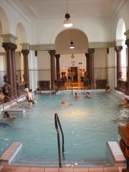 A Széchenyi gyógyfürdő keleti szárnyában található medencetér (Budapest, XIV. ker.)